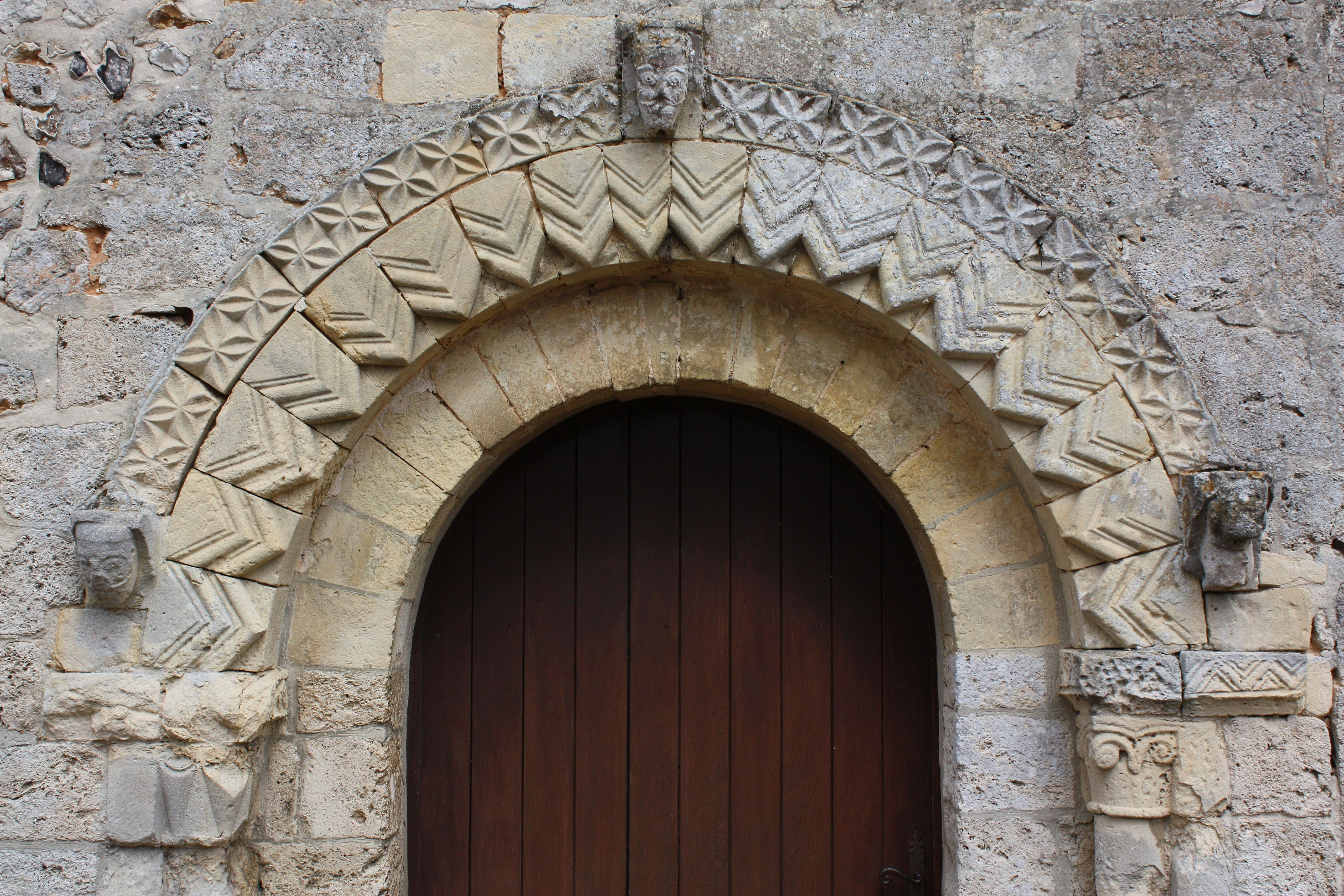 Portail Sud